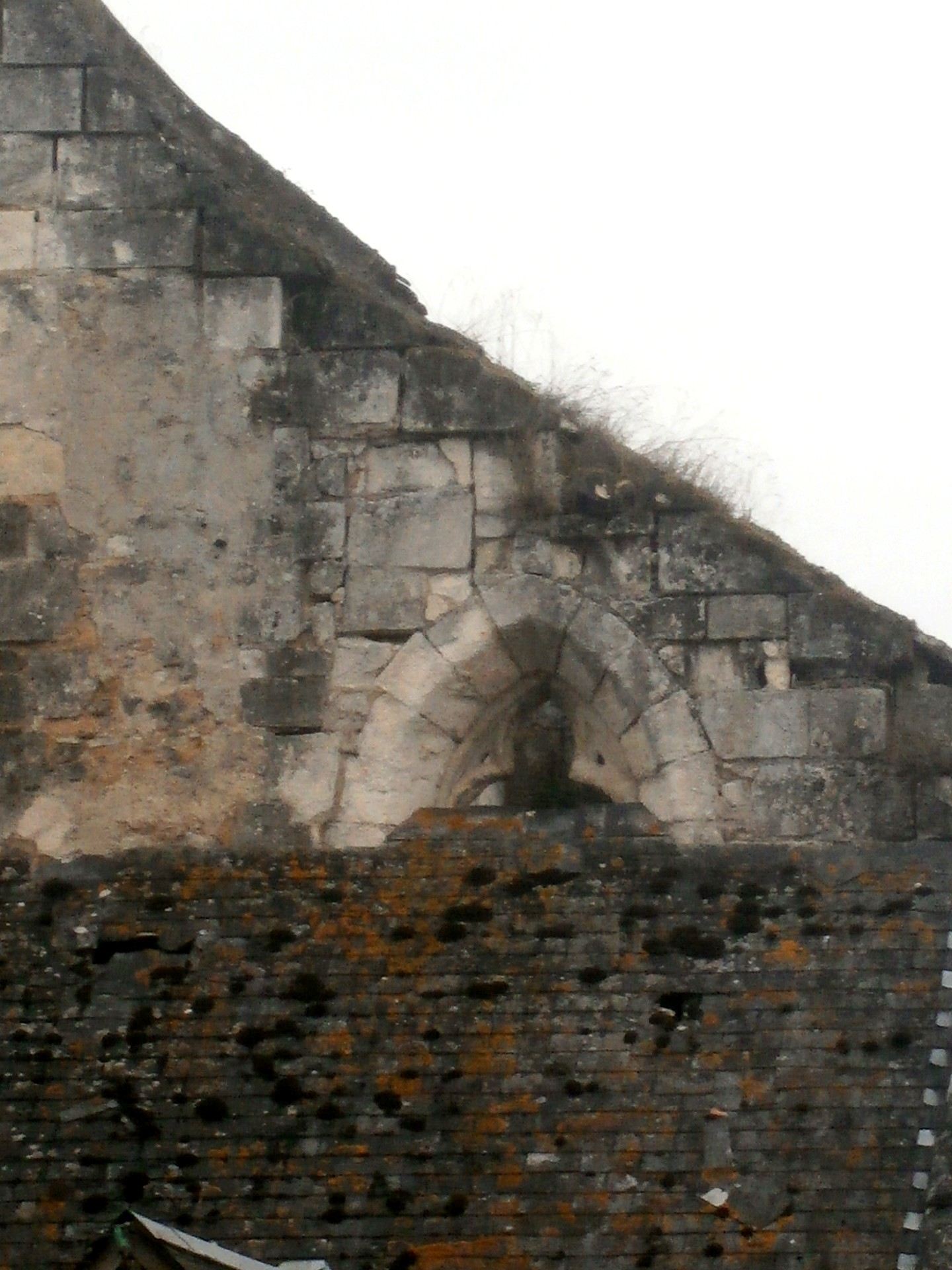 Baie de l'ancienne abbatiale de Beaugerais